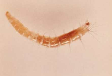 Xenopsylla cheopis (puce du rat) larve - domaine public - (image id 2741) Image recadrée et pivotée à 90°.